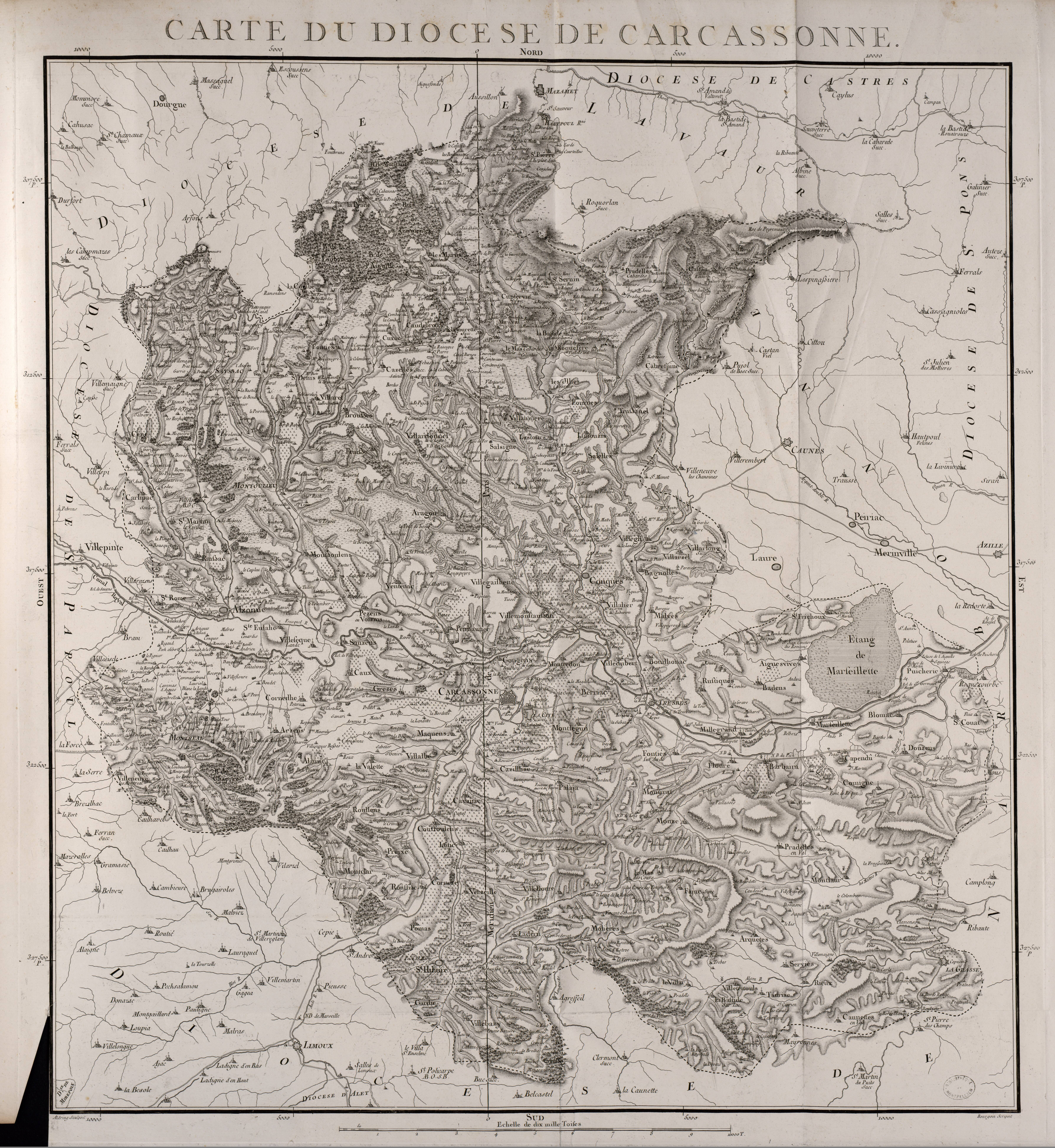 Carte du diocèse de Carcassonne, extraite de Diocèses de la province du Languedoc (1781)